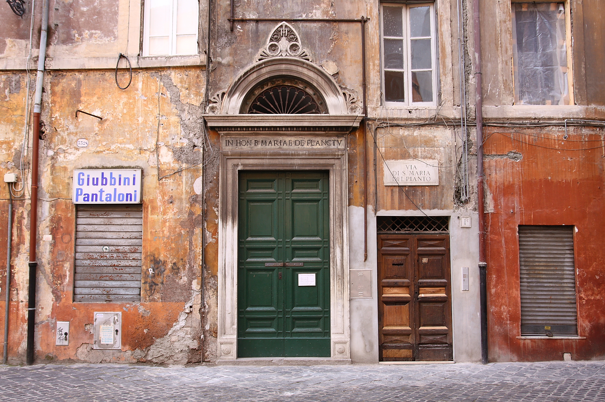 Santa Maria del Pianto